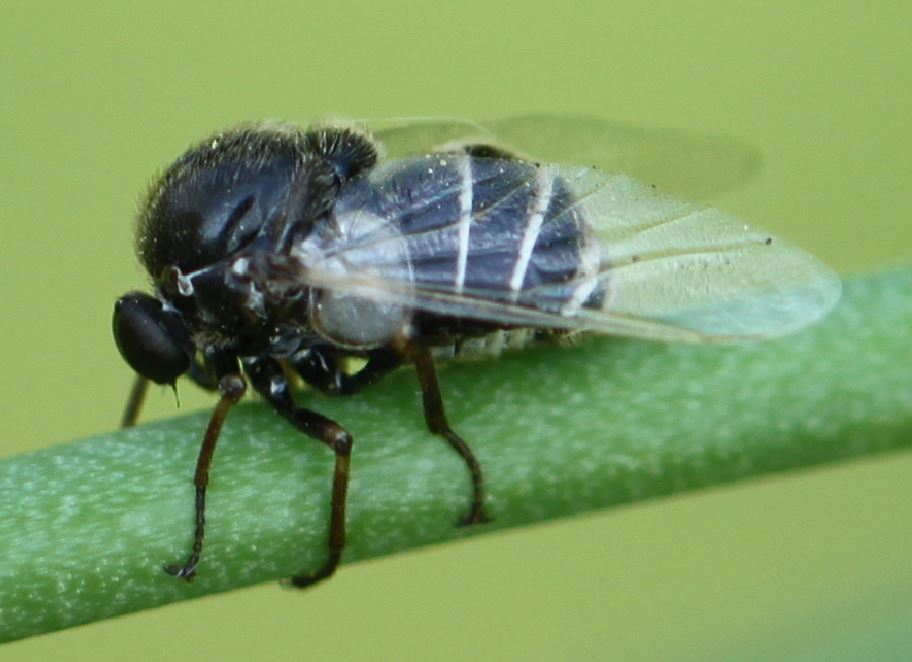 Kugelfliege Ogcodes cf. zonatus am 6. Juni 2018 in der Schwetzinger Hardt an wildem Spargel